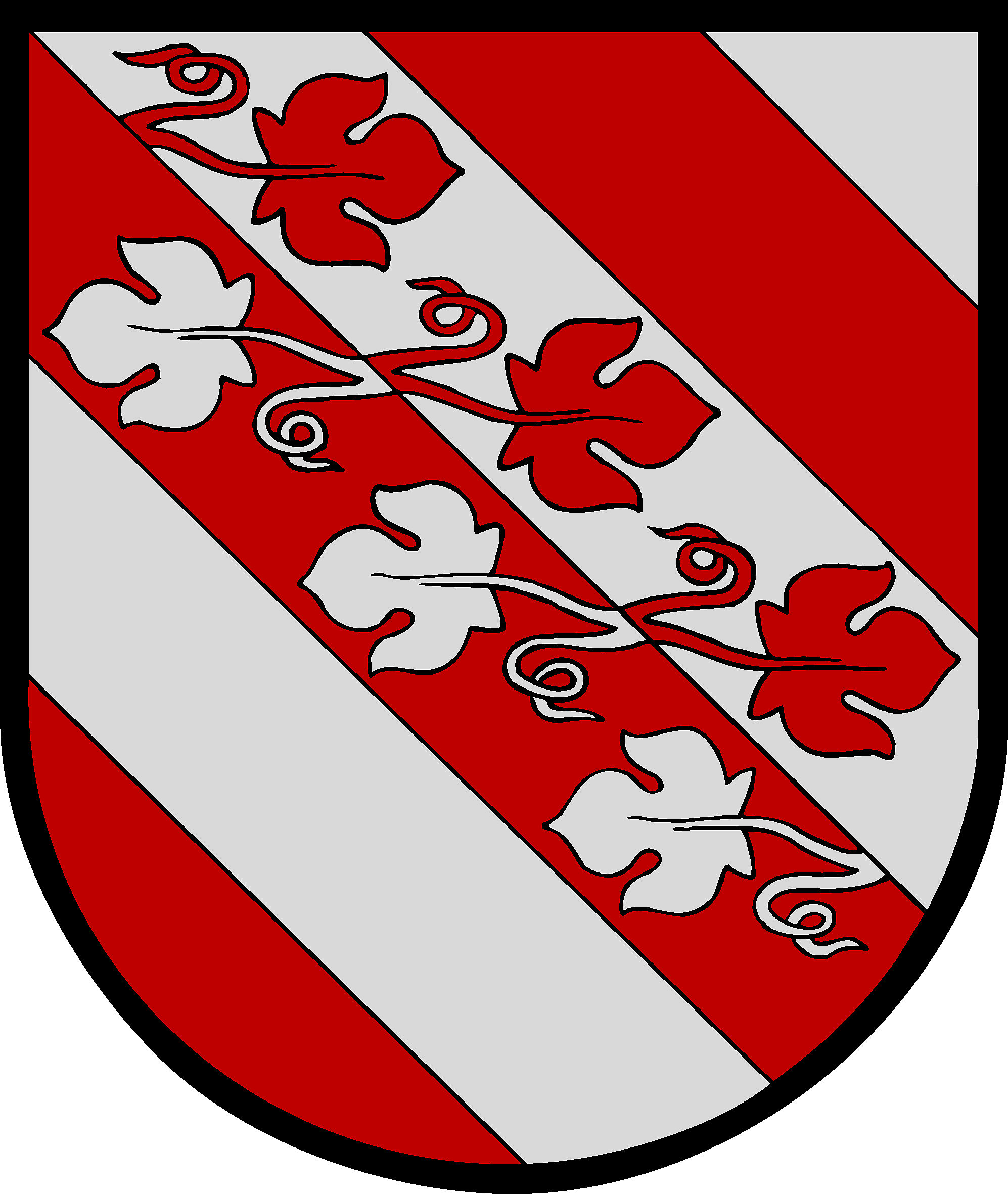 Wappen der ehemaligen Gemeinde Aibl, Steiermark